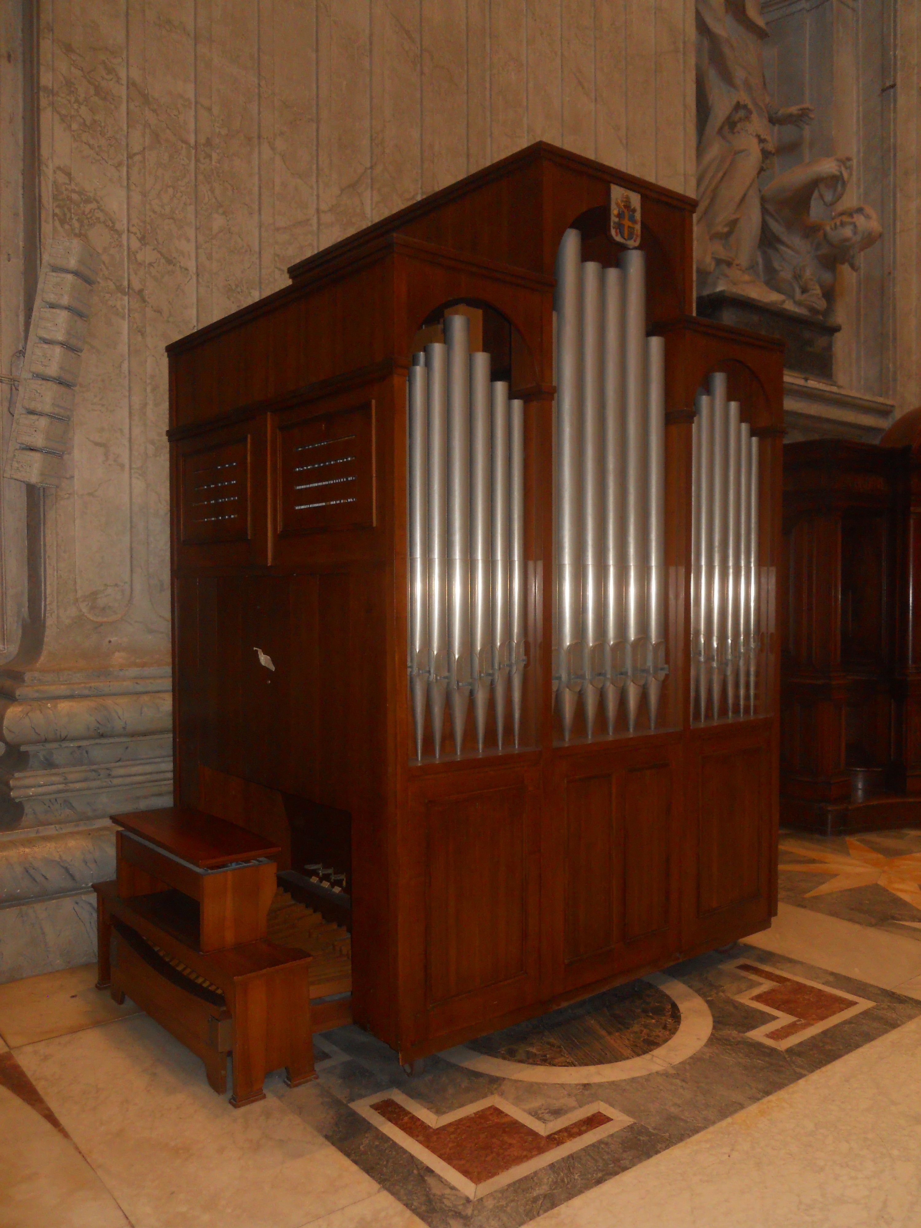 Walcker opus 5757 (1980): I - Hauptwerk: Prinzipal 8' - Rohrflöte 8' - Oktave 4' - Feldflöte 2' - Mixtur IV II - Positiv': Holzgedackt 8' - Gemshorn 4' - Prinzipal 2' - Scharf III Pedal: Subbass 16' - Posaune 8'